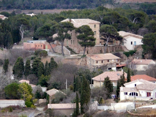 Chateau de Boutenac